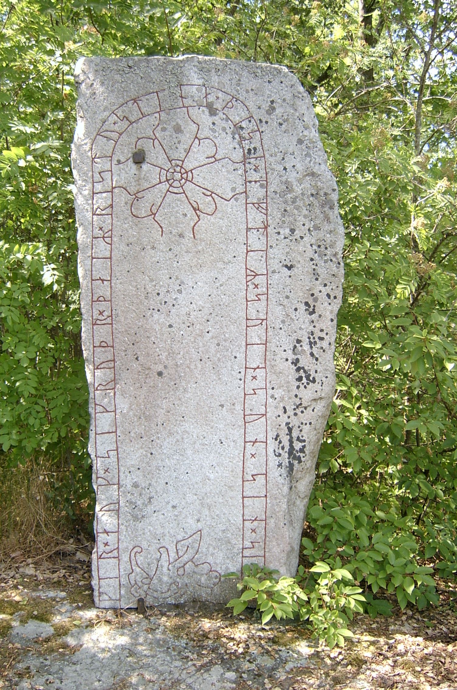 Markim 5:1. (U 326). Runristning. Fast fornlämning.